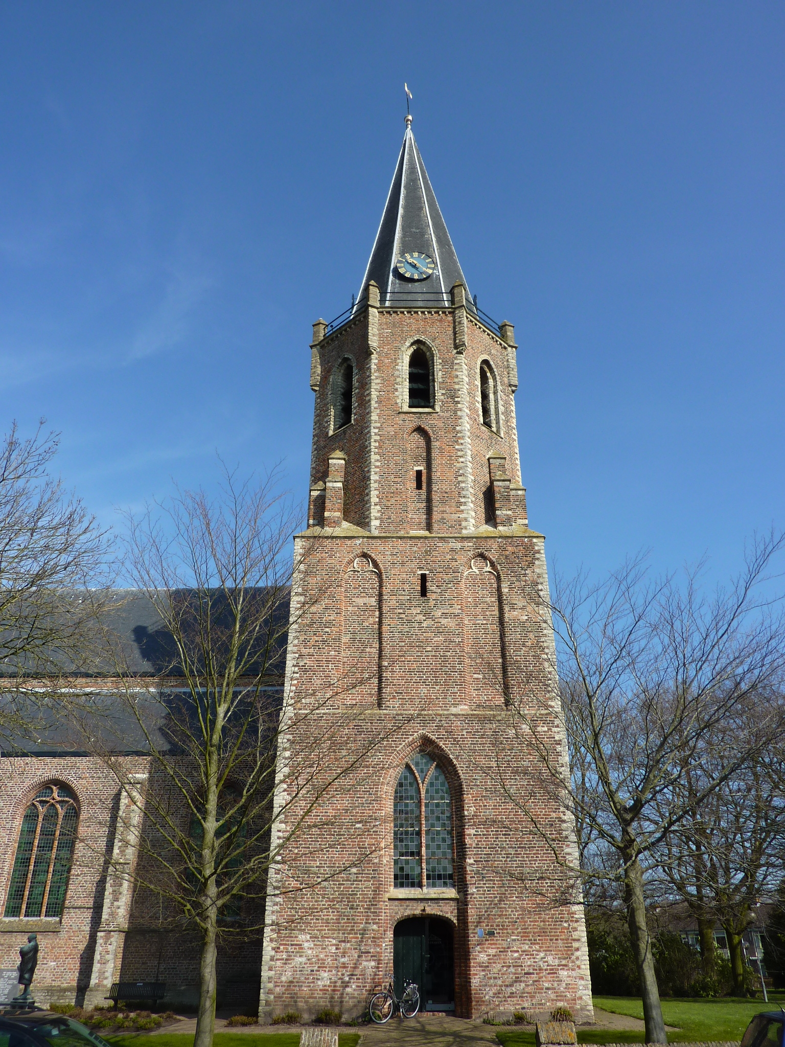 Johanneskerk (Kruiningen)